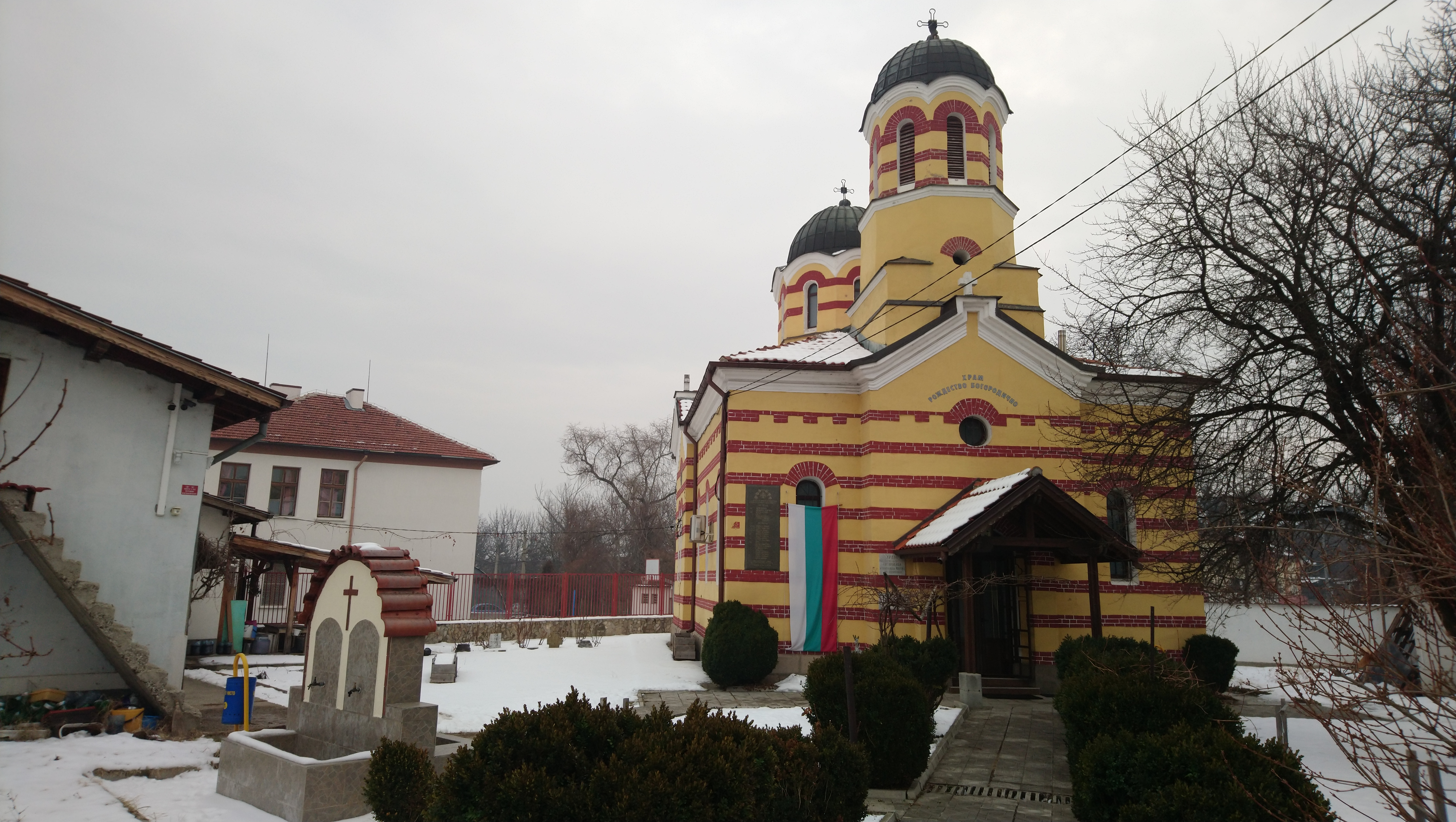 Църквата Рождество Богородично в квартал Филиповци, София